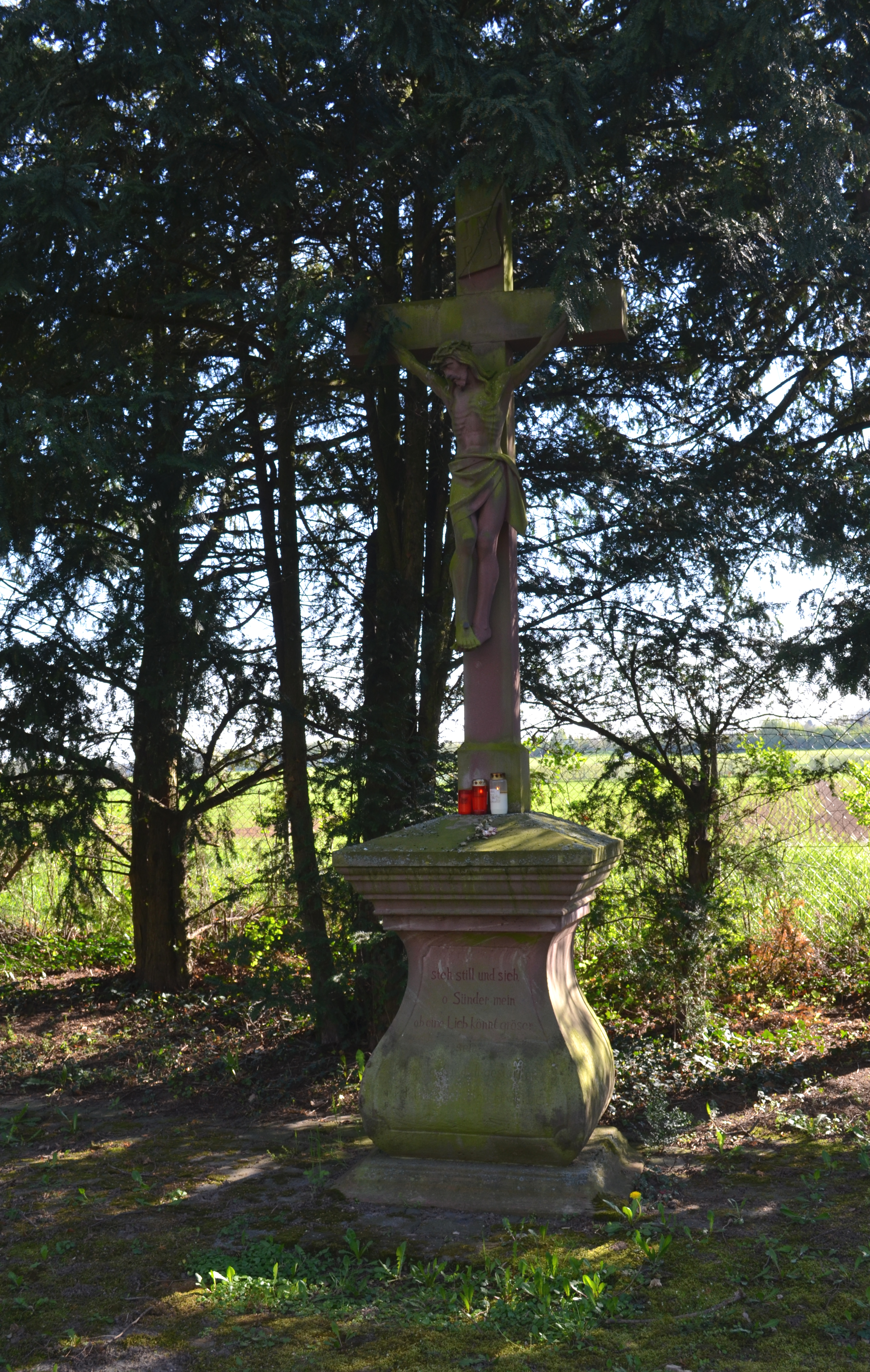 Frankfurt-Zeilsheim, Friedhof, Kreuz